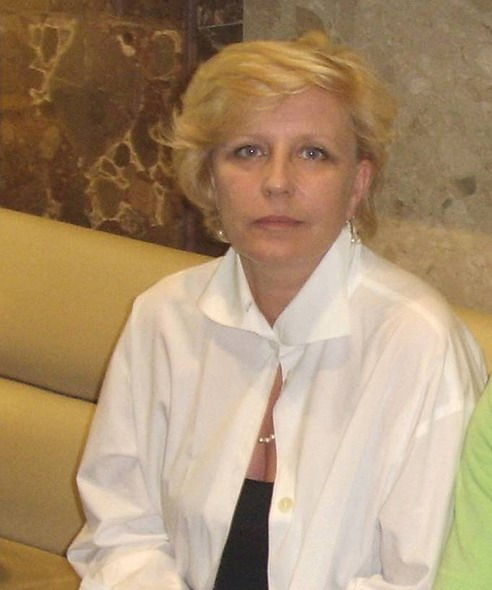 Krystyna Janda (ur. 18 grudnia 1952 w Starachowicach) – polska aktorka filmowa i teatralna, prozaiczka i felietonistka, piosenkarka.